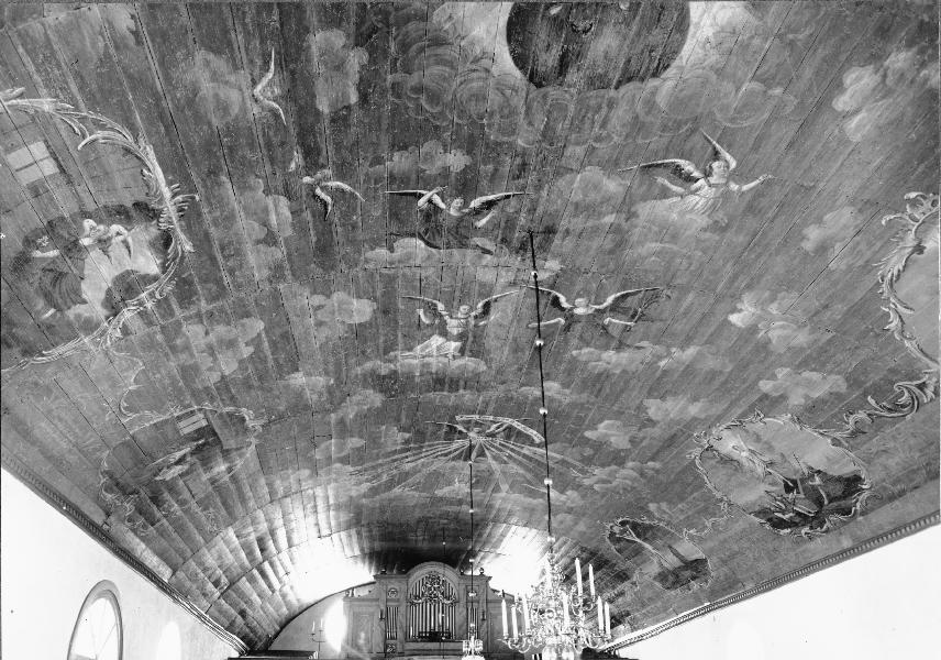 Takvalvet. Efter konservering. Kategori: (03) Målningar på träTakvalvet. Efter konservering.